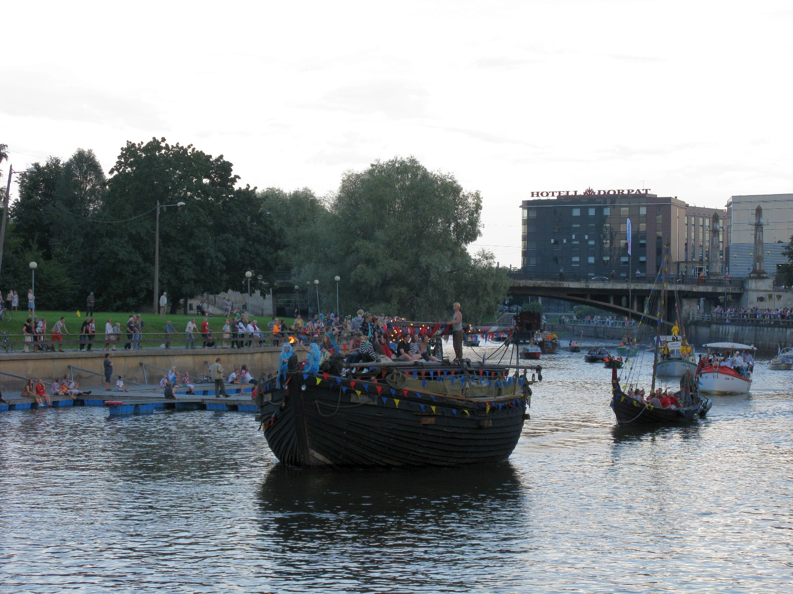 Jõeparaad Emajõe festivalil, esiplaanil Jõmmu ja viikingilaev, 18. august 2012